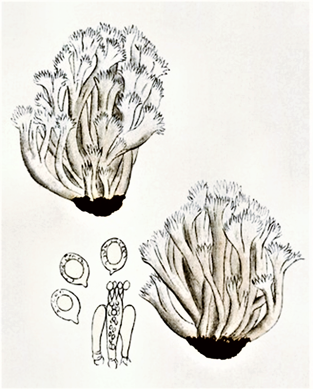 Giacomo Bresadola: Clavaria cristata Holmsk., 1790 ex Pers., 1801, heute Clavulina coralloides (L., 1753 ex Schröter, 1888)